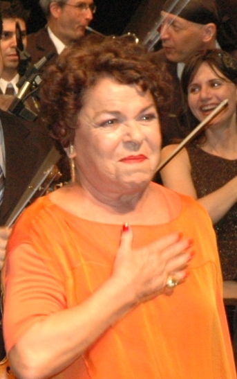 A cantora Miúcha, na cerimônia de reabertura da Biblioteca Pública Municipal Mário de Andrade, nas comemorações do 457º aniversário da cidade de São Paulo. Foto: Marcos Fioravanti